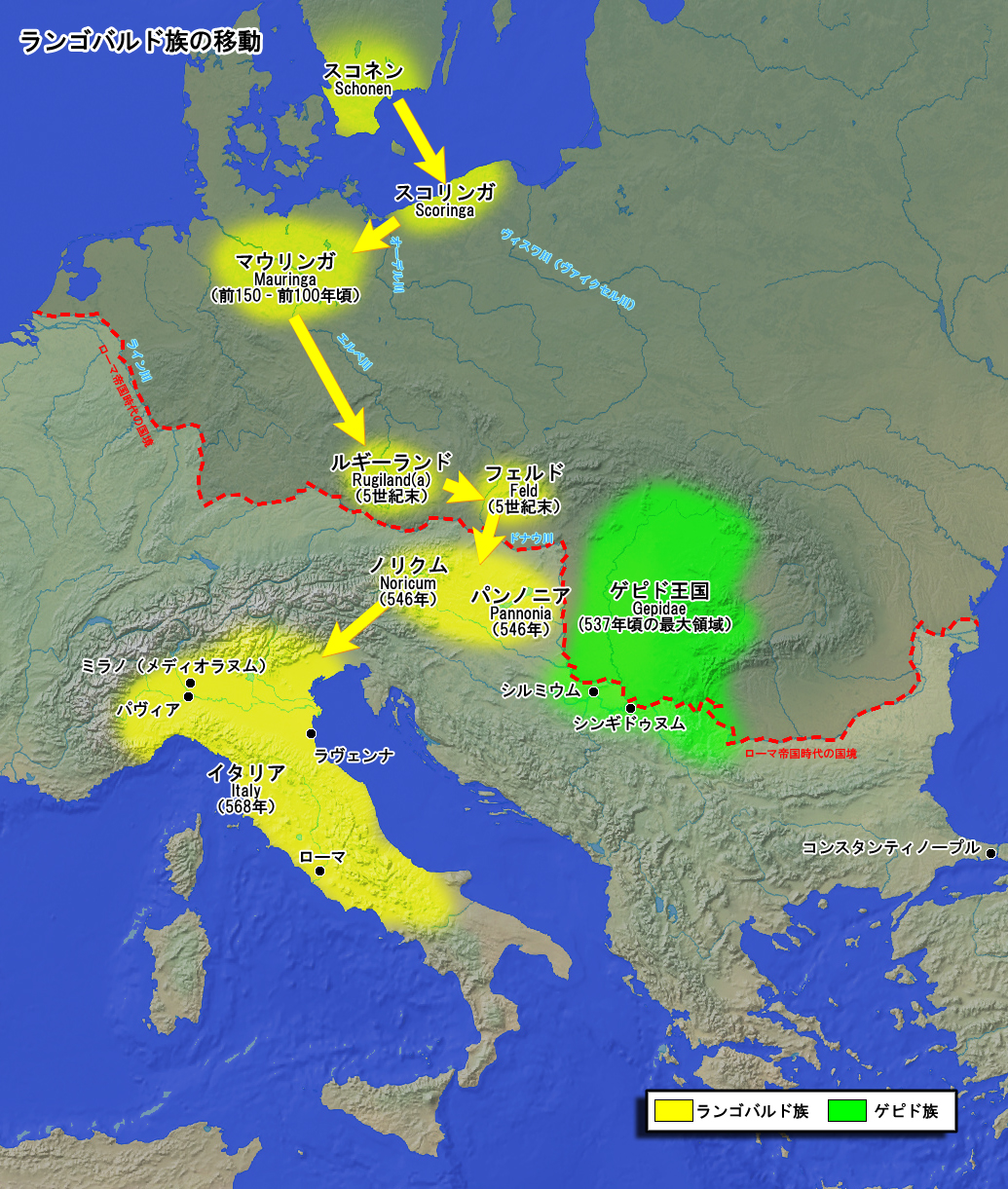 ランゴバルド族（人）の移動経路図。吉川弘文館『世界史年表・地図』の図と、久野浩「民族移動期におけるランゴバルド族の動向」の文章を元に作成。